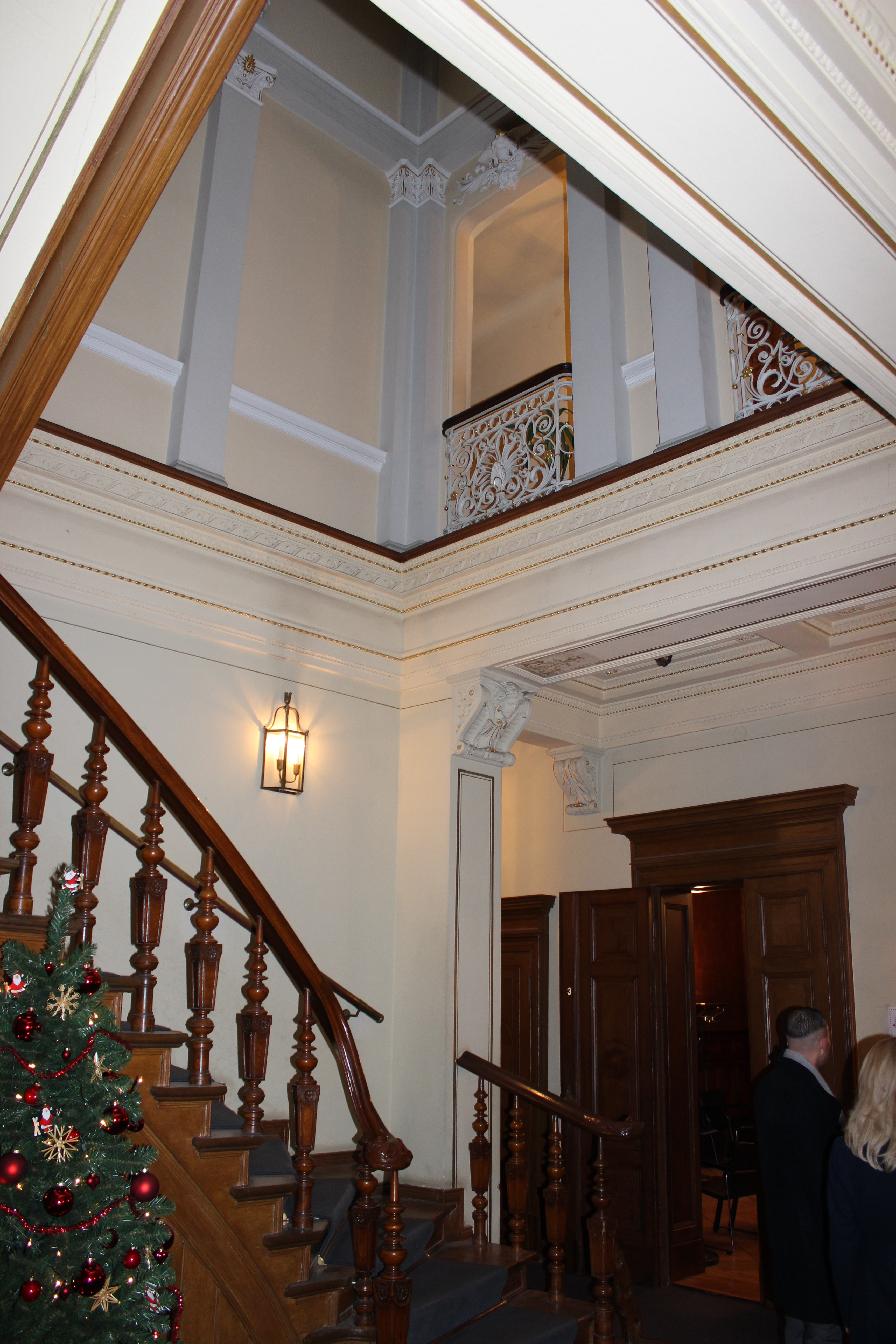 Villa Kogge, Berlin